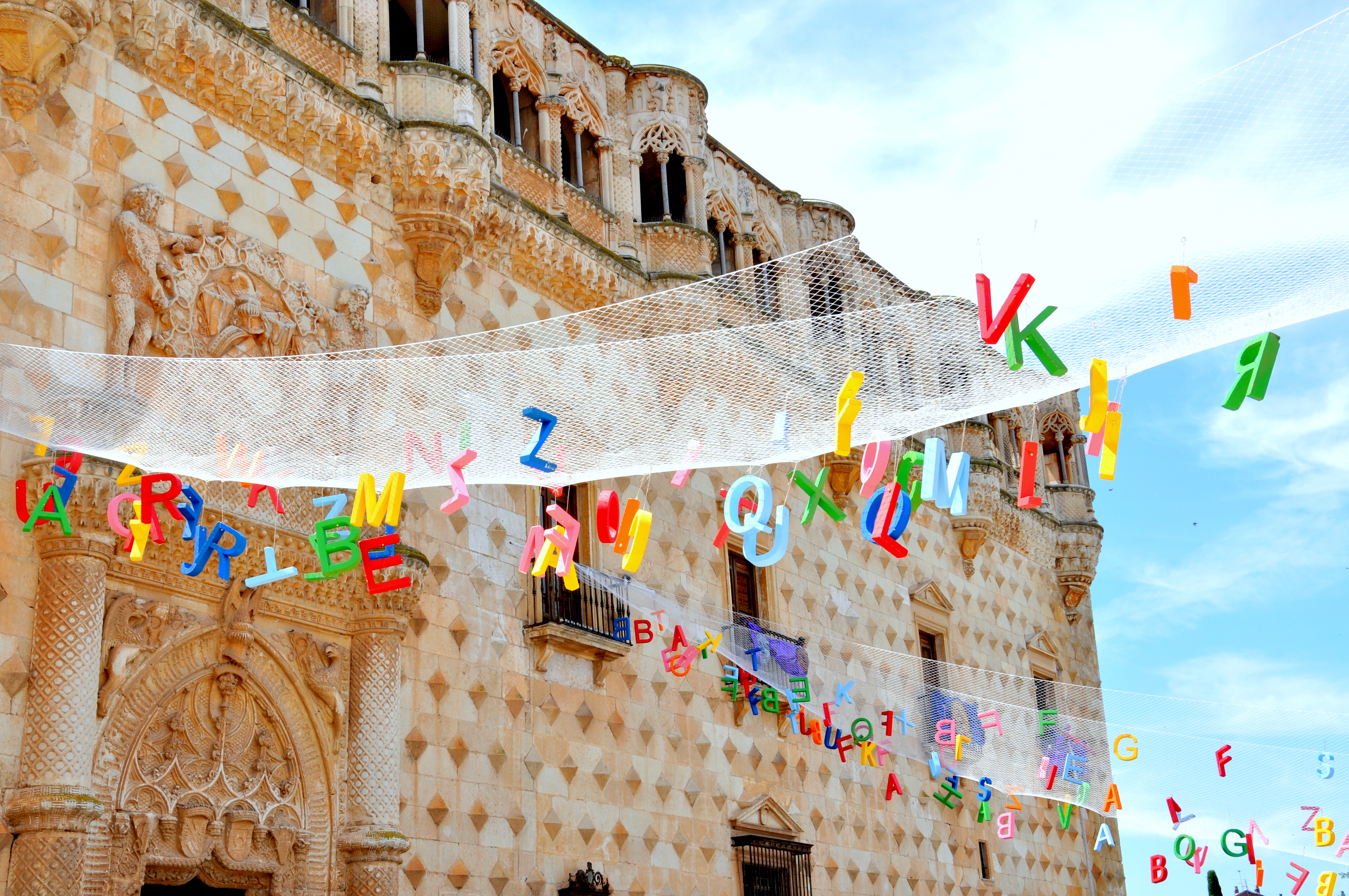 Palacio del Infantado con la decoración del maratónDSC 9102